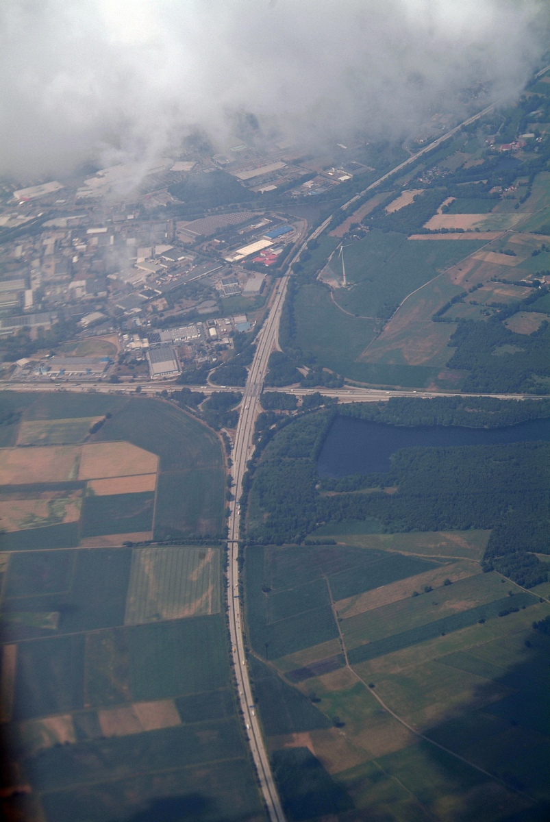 Bilder aus der Luft Bremer Kreuz A1 A27